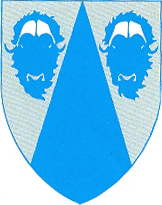 Wappen von Ittoqqortoormiit